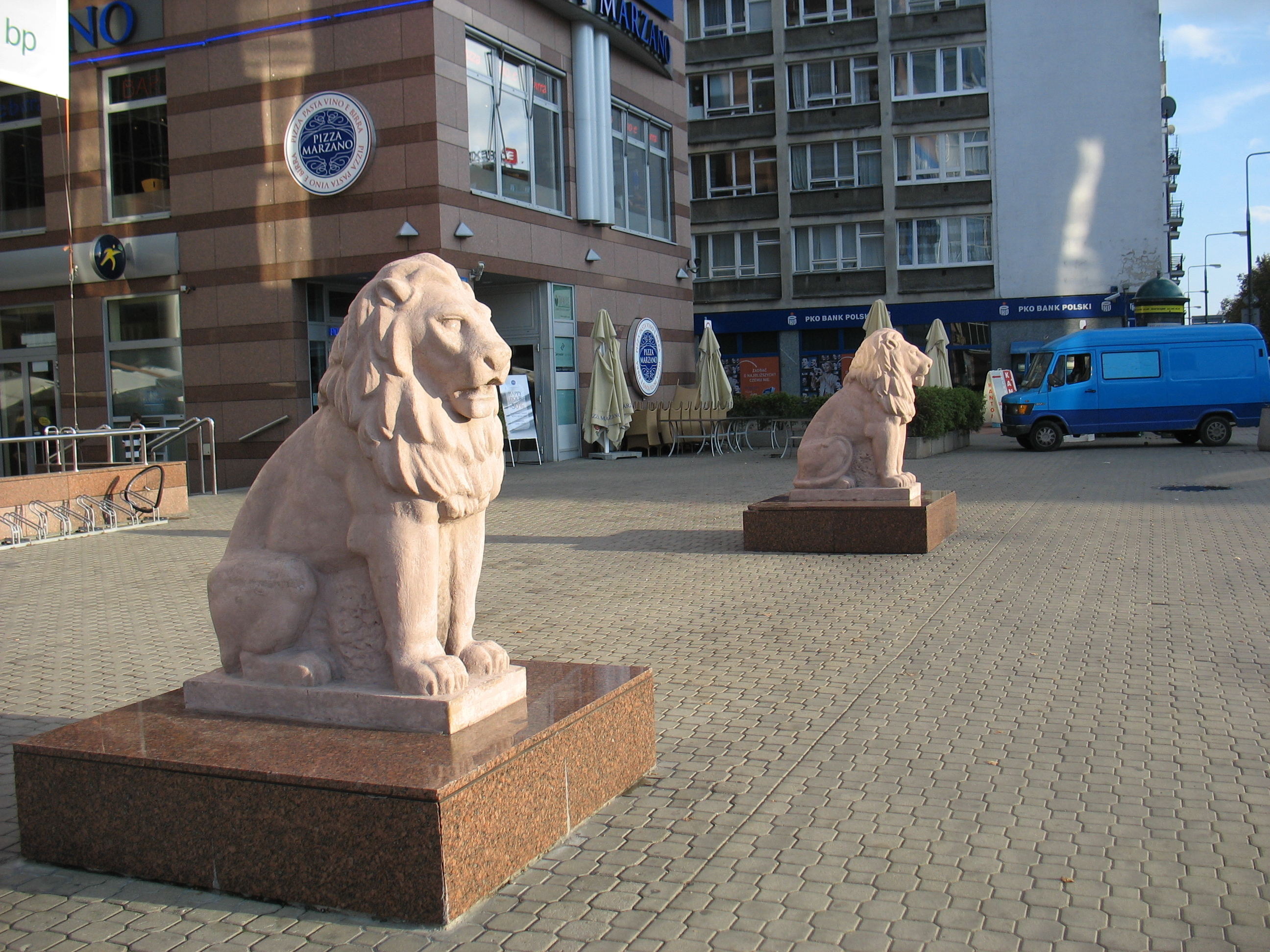 Lwy przed wejściem do kina Silver Screen w Warszawie (dawniej przed wejściem do Kina Moskwa). Rzeźby wykonane zostały przez Józefa Trenarowskiego.